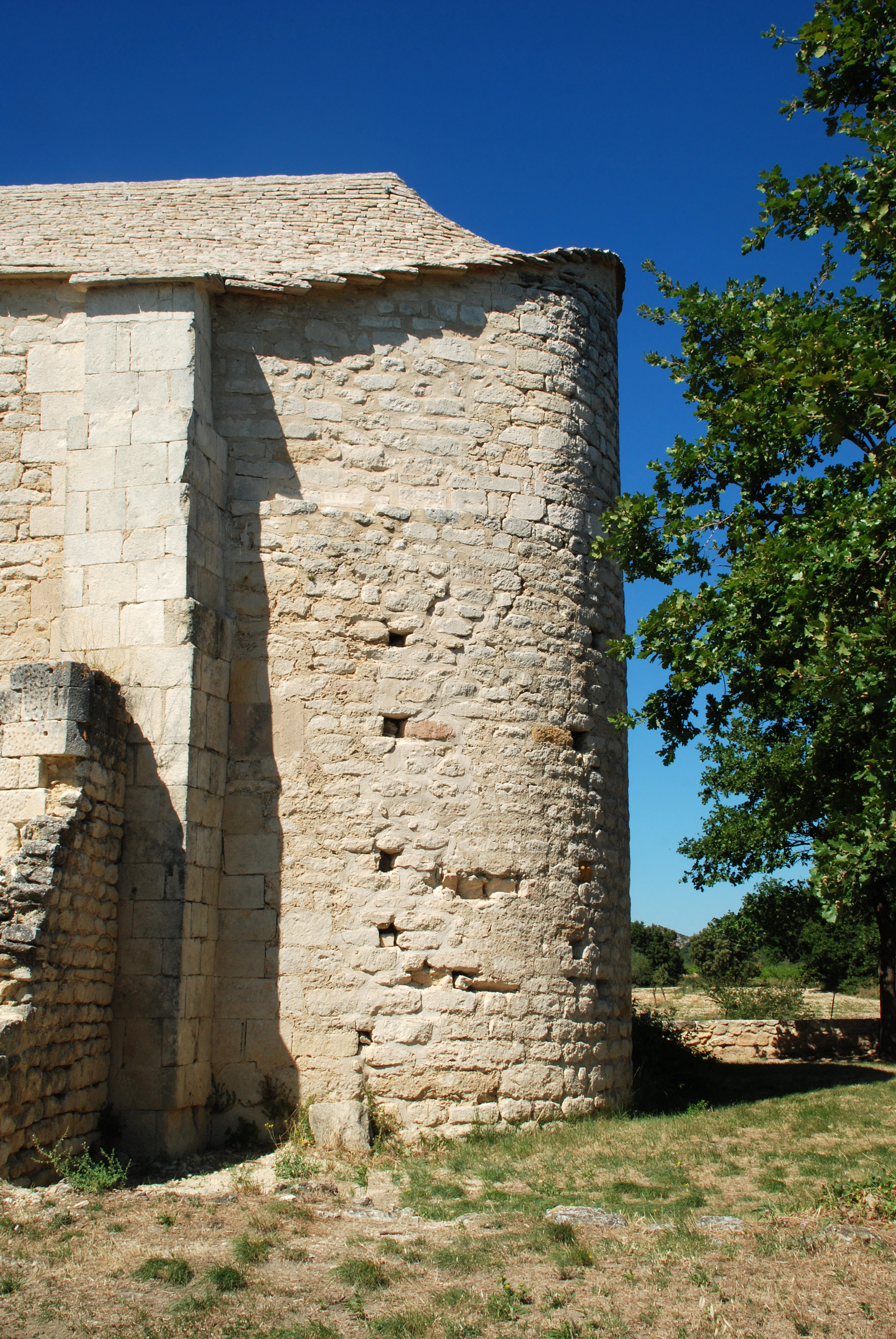 France - Gard - Chapelle Saint-Étienne de Saint-Hilaire-d'Ozilhan .